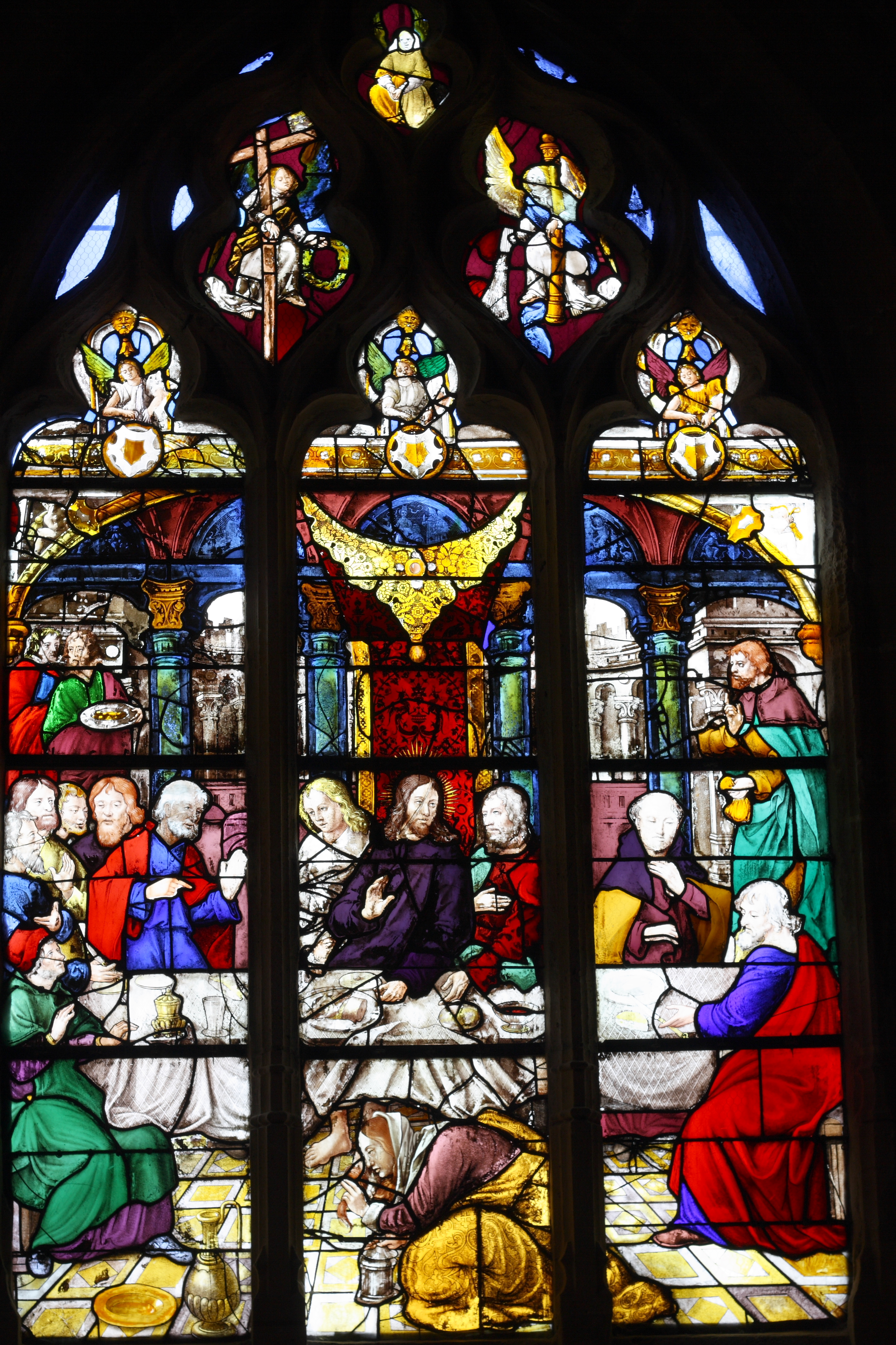 Katholische Pfarrkirche Saint-Martin in Triel-sur-Seine, einer Gemeinde im Département Yvelines (Île-de-France), Bleiglasfenster aus dem 16. Jahrhundert, Darstellung: Gastmahl im Haus von Simon dem Pharisäer, im Vordergrund Maria Magdalena, die Jesus die Füße salbt